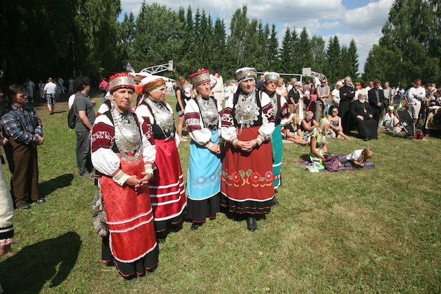 XVIII Setu Kuningriigi päev Obinitsas